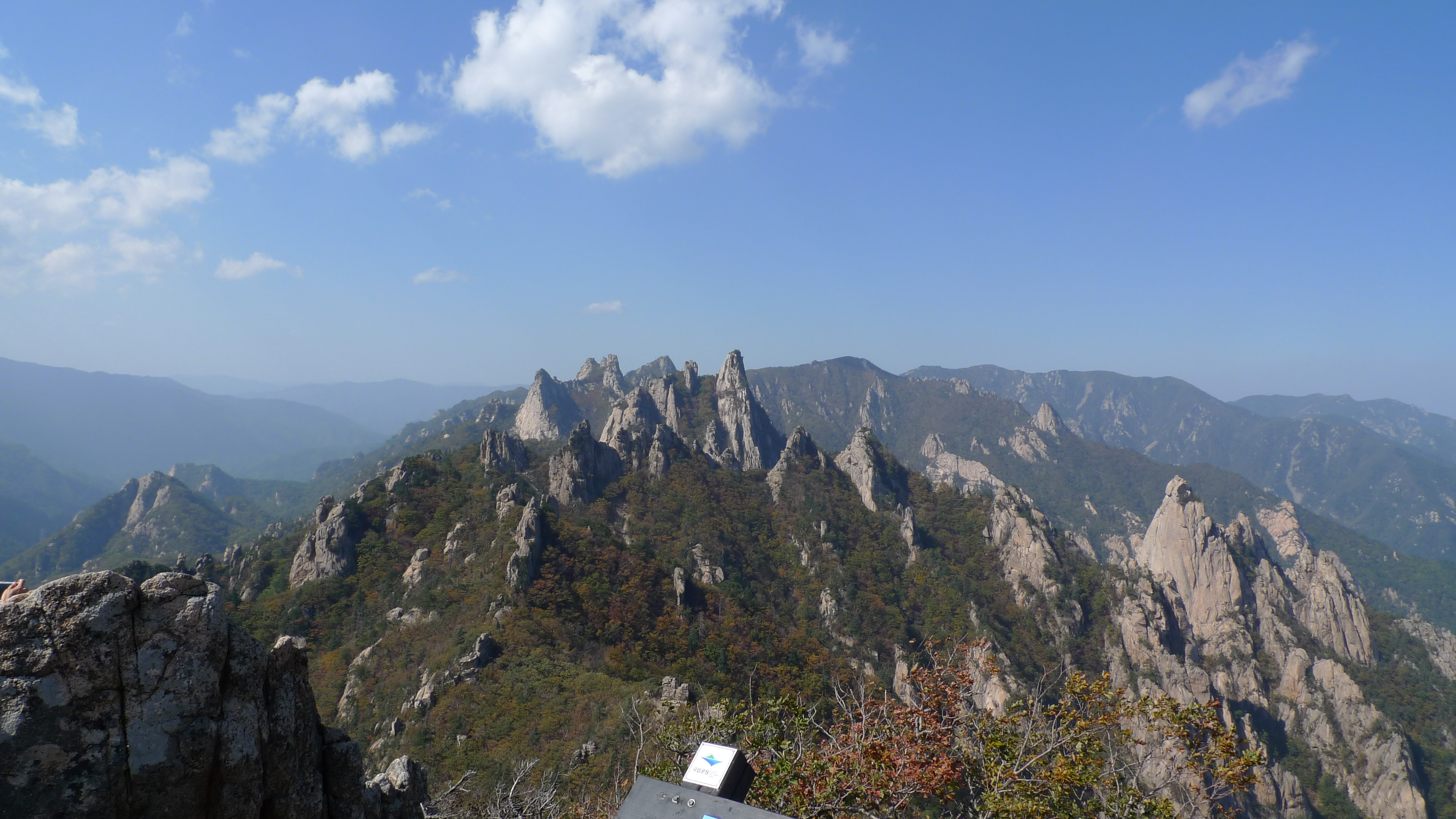 설악산 공룡능선